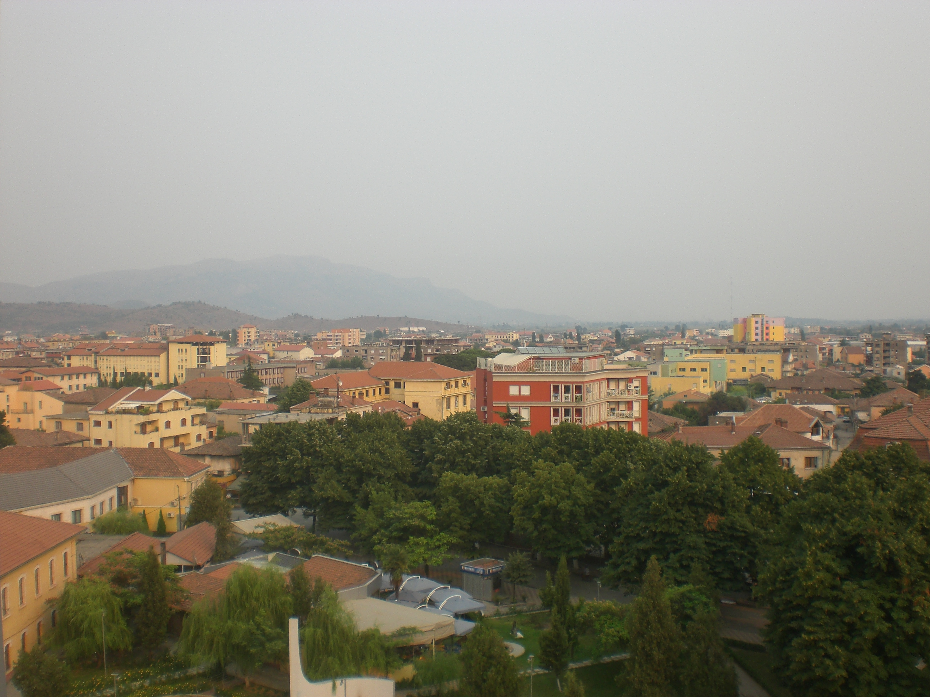 Shkoder's Low Skyline